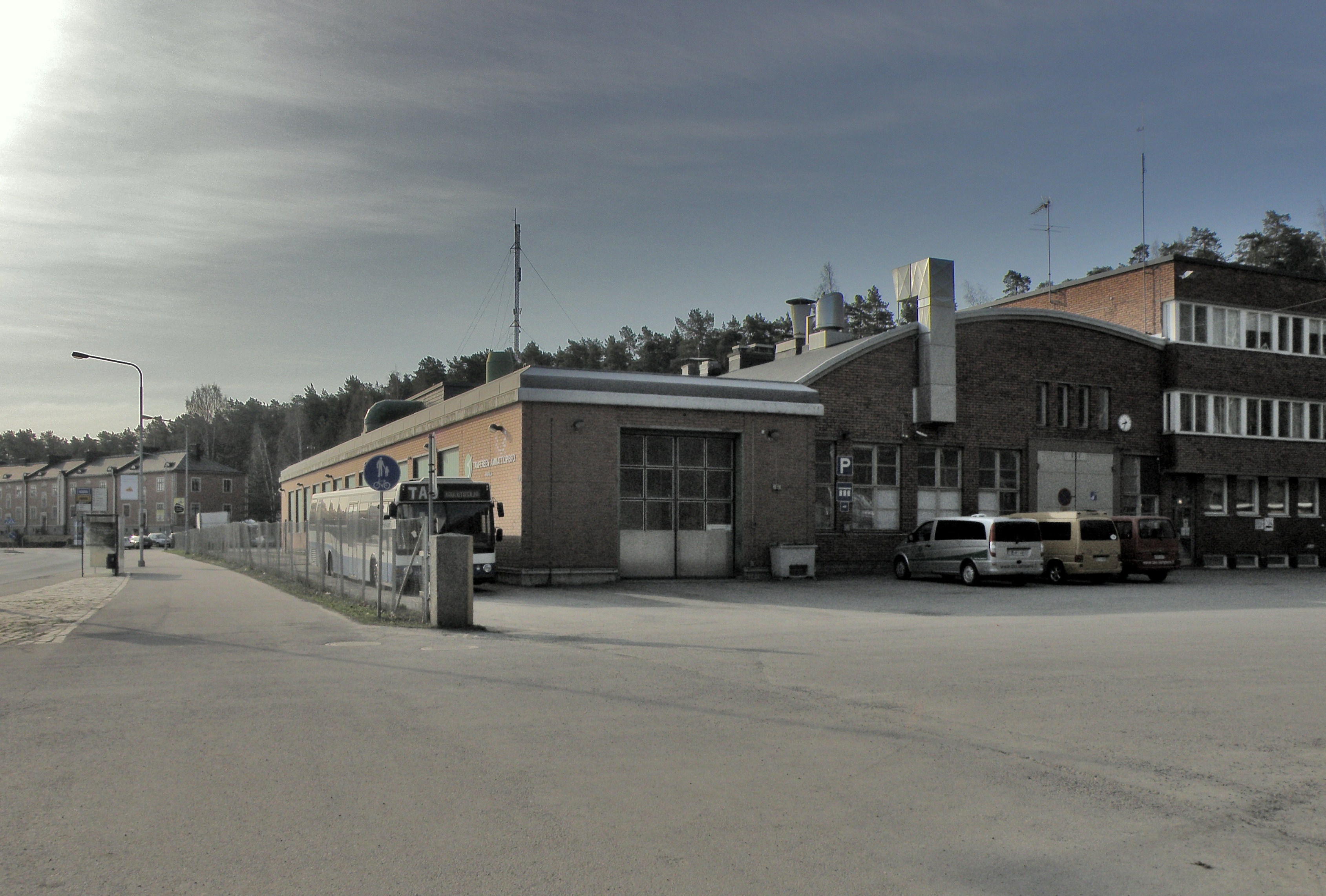 "rollikka hallit" Pirkankadun kupeessa